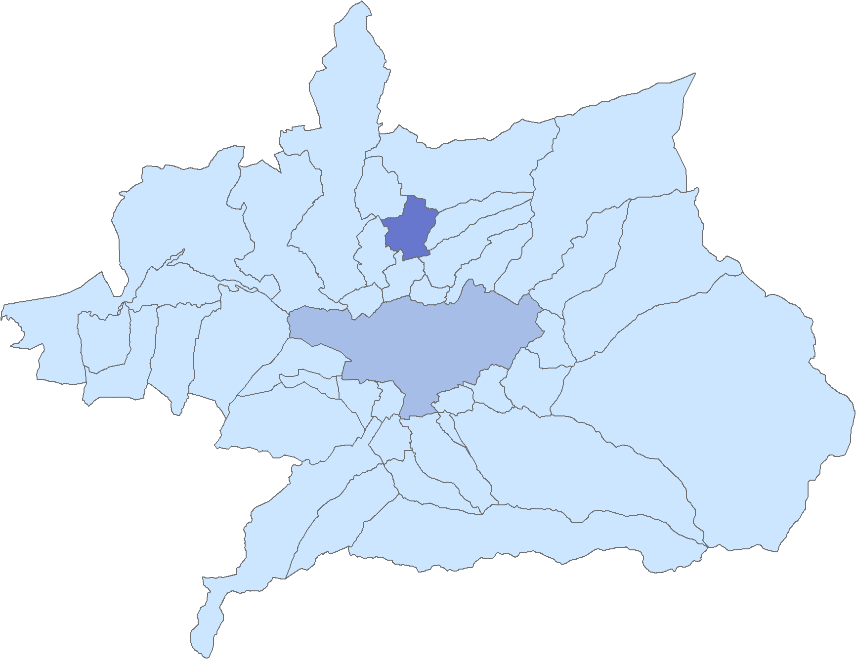 Situación del municipio de Güevéjar respecto a la comarca de la Vega de Granada, en España.